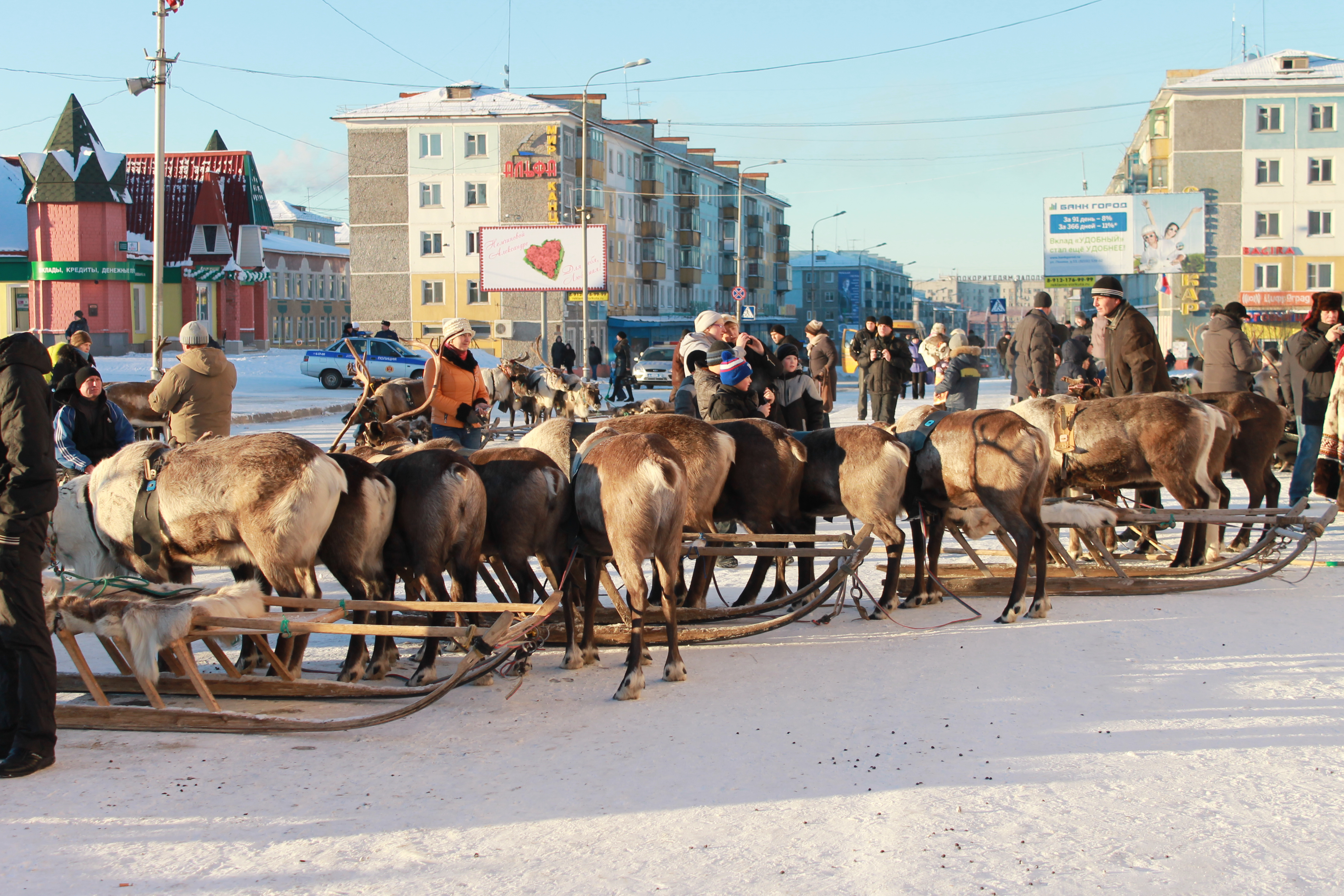 День оленевода 04.11.12